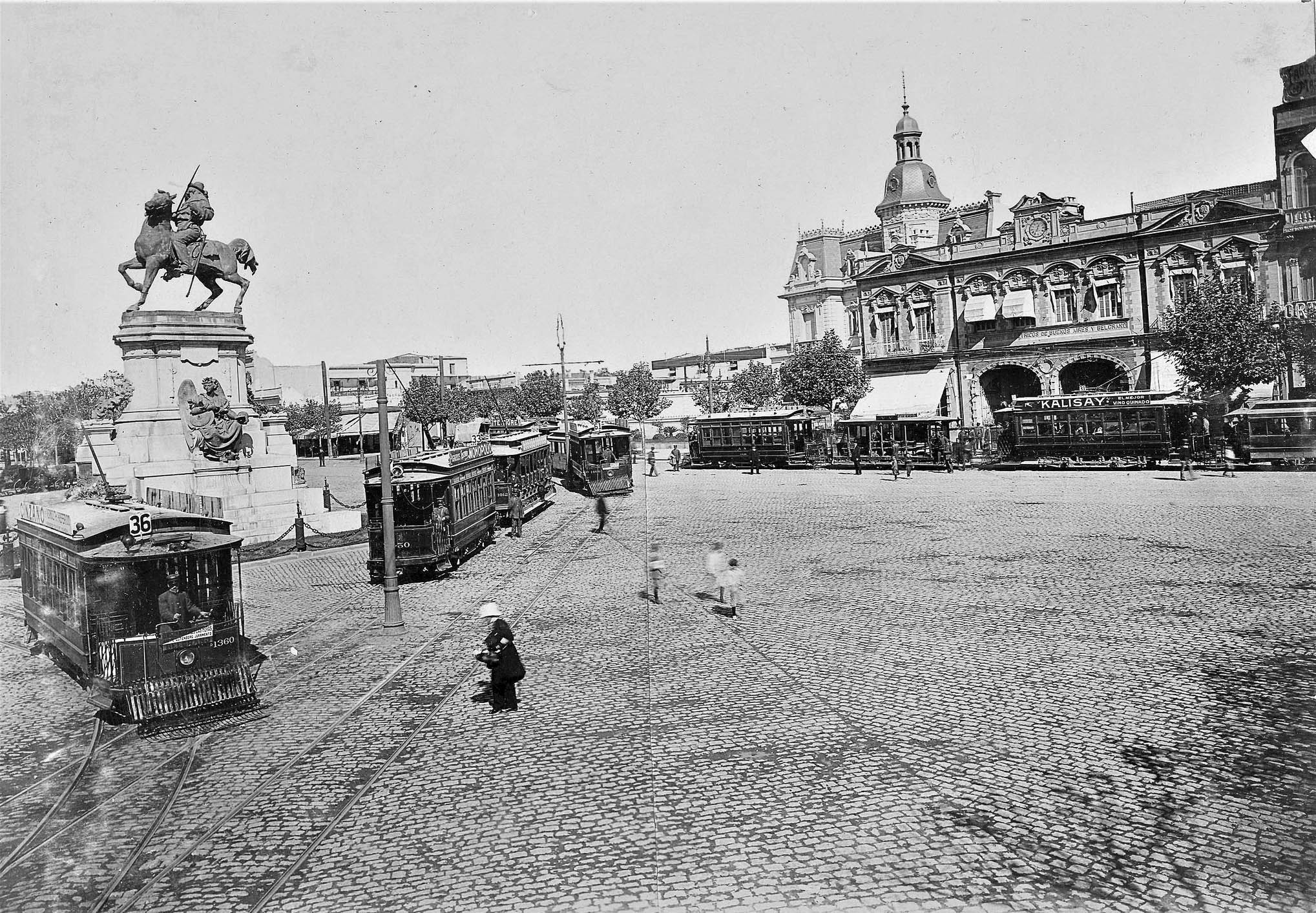 Imagen de la Plaza Italia, finales del siglo XIX.Inventario 213901.